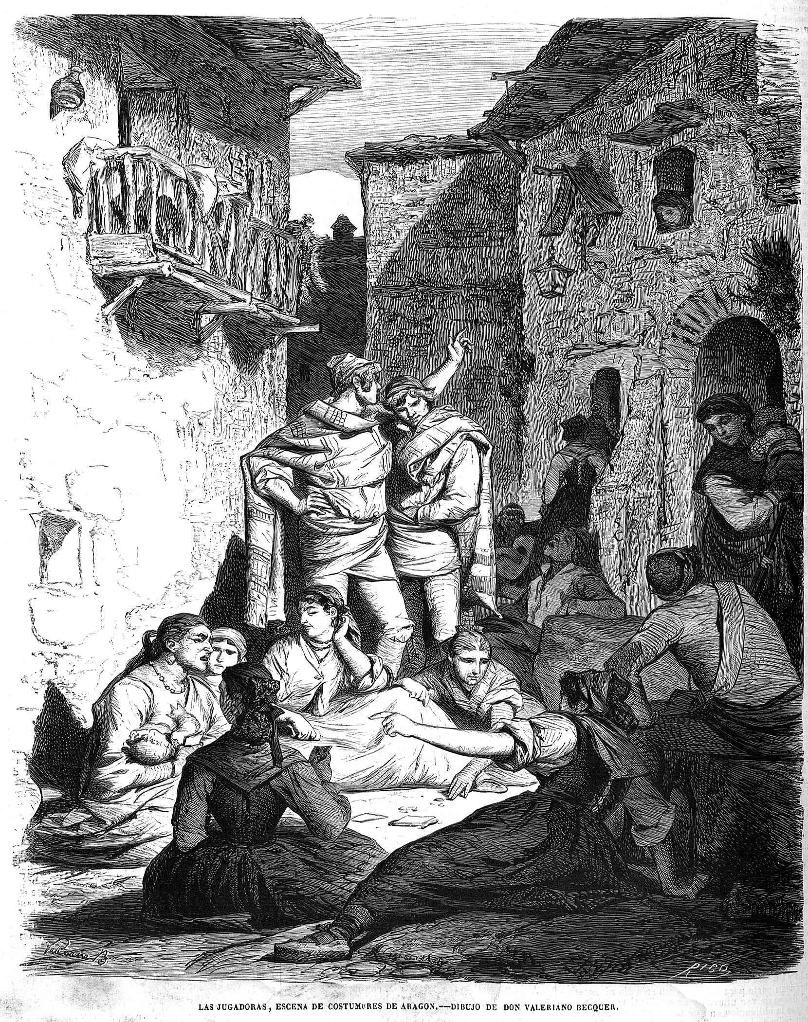 Las jugadoras, escena de costumbres de Aragón, de Valeriano Domínguez Bécquer, en la revista El Museo Universal.